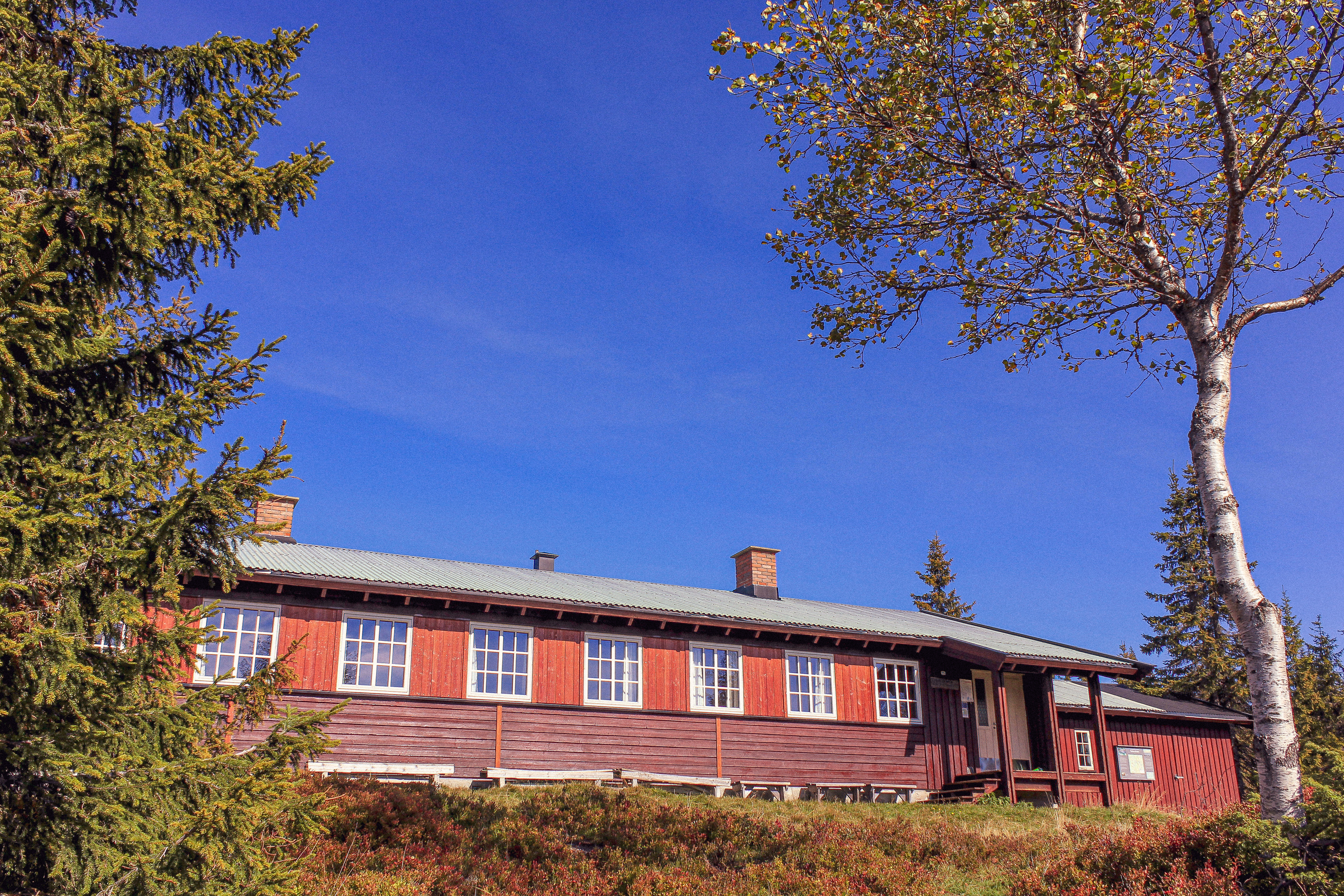 Rausteinshytta på Totenåsen.